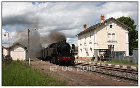 La gare d'huriel lors du festirail 2010